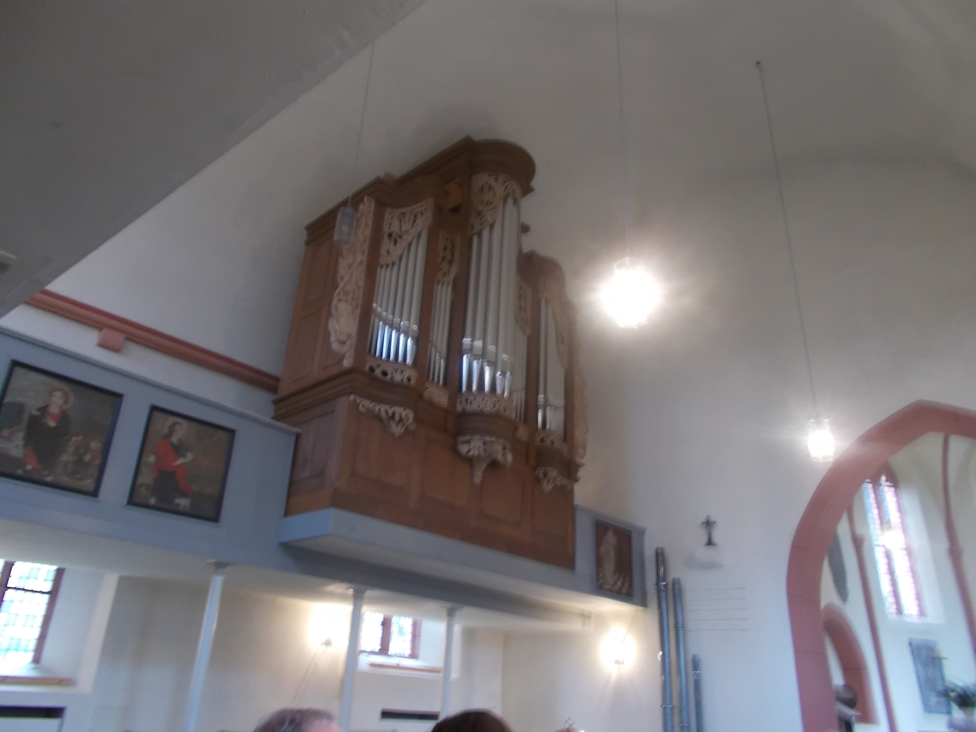 Stumm-Orgel in Herstein